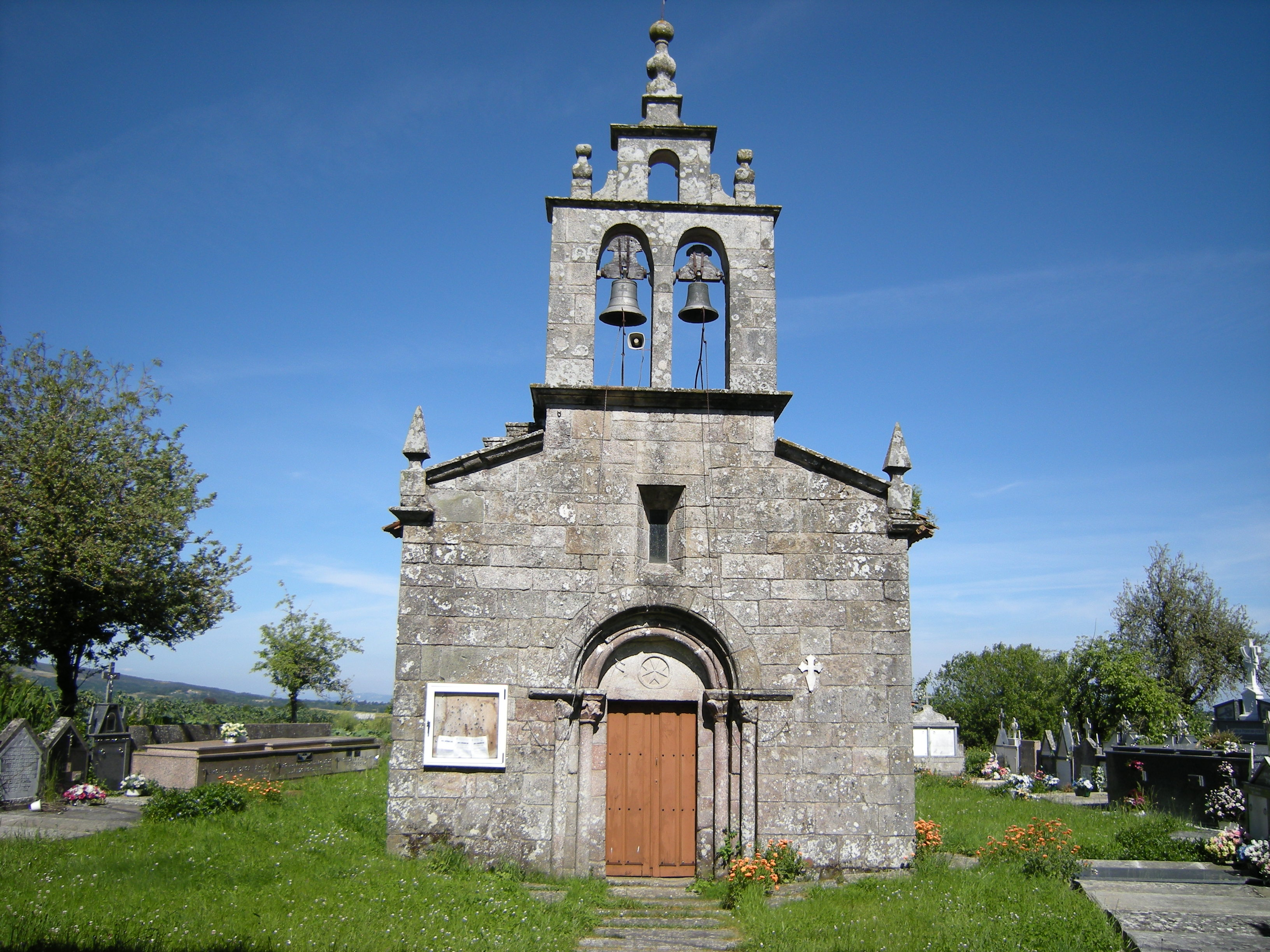 Pequeña iglesia de origen románico que se encuentra en la comarca de A Ulloa.